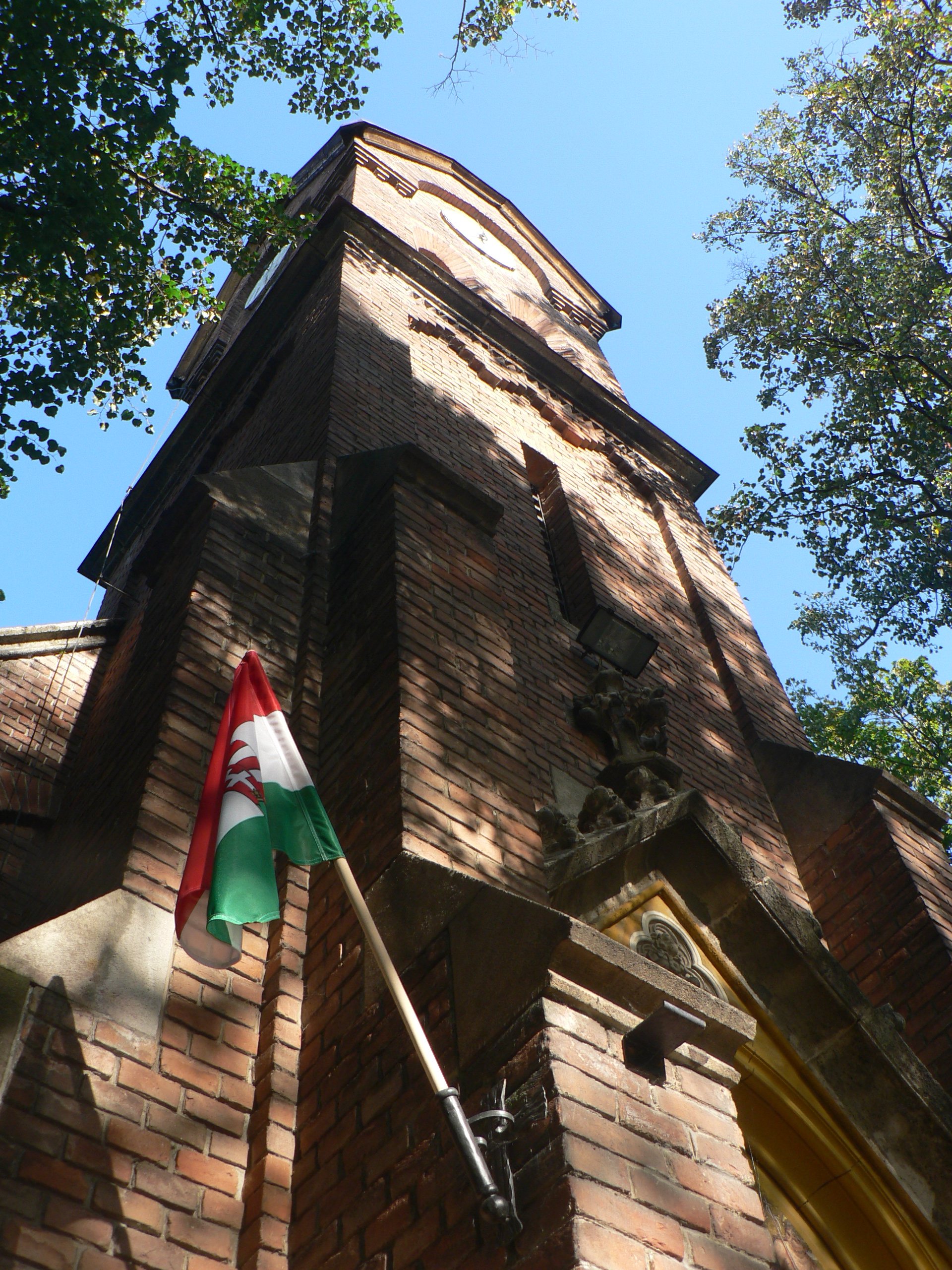 Leányfalu. Római katolikus templom